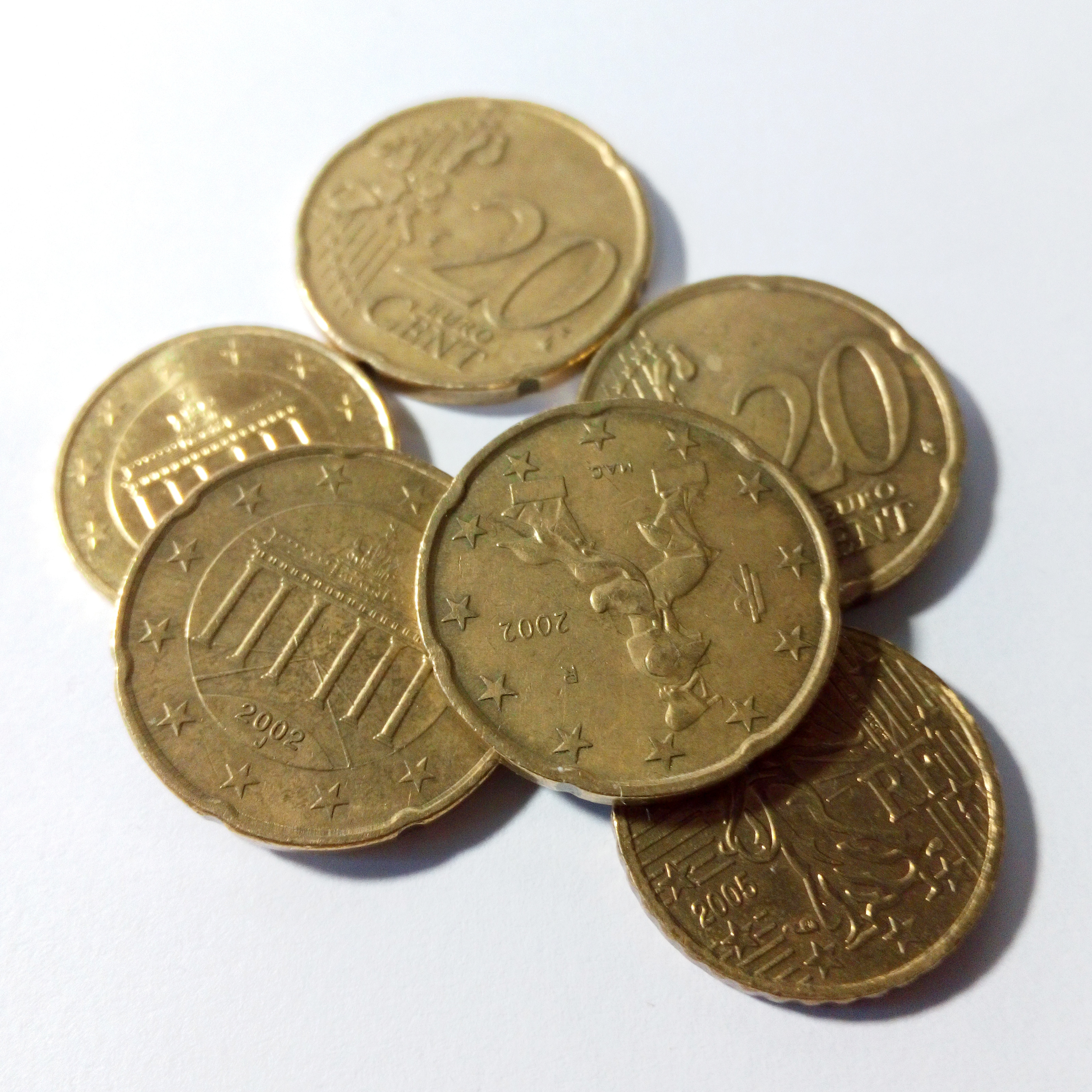 Ein kleiner Haufen von Euromünzen.